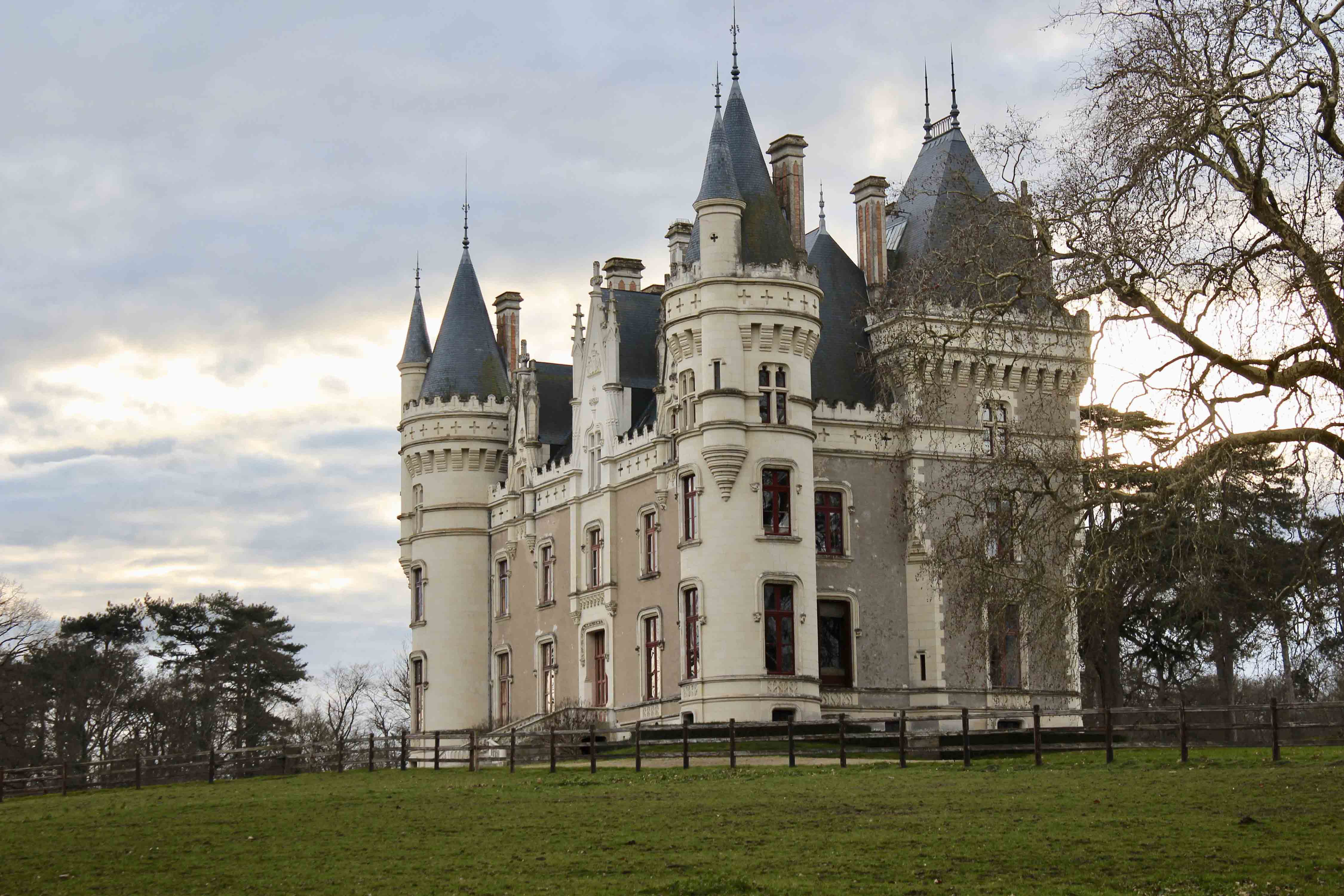 La façade nord-est du château de La Baronnière